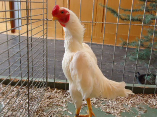 Shamo